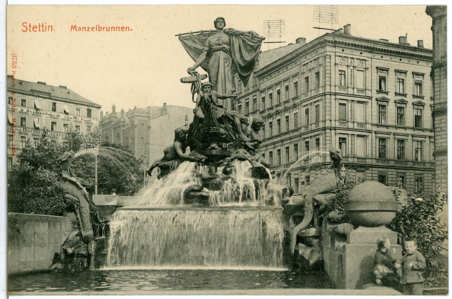 Stettin; Manzelbrunnen This postcard is from publisher Brück & Sohn in Meißen ( This postcard has a unique number 03753 and is available in a higher resolution at the publisher. This images was uploaded in a cooperation project between Wikipedians and the publisher.